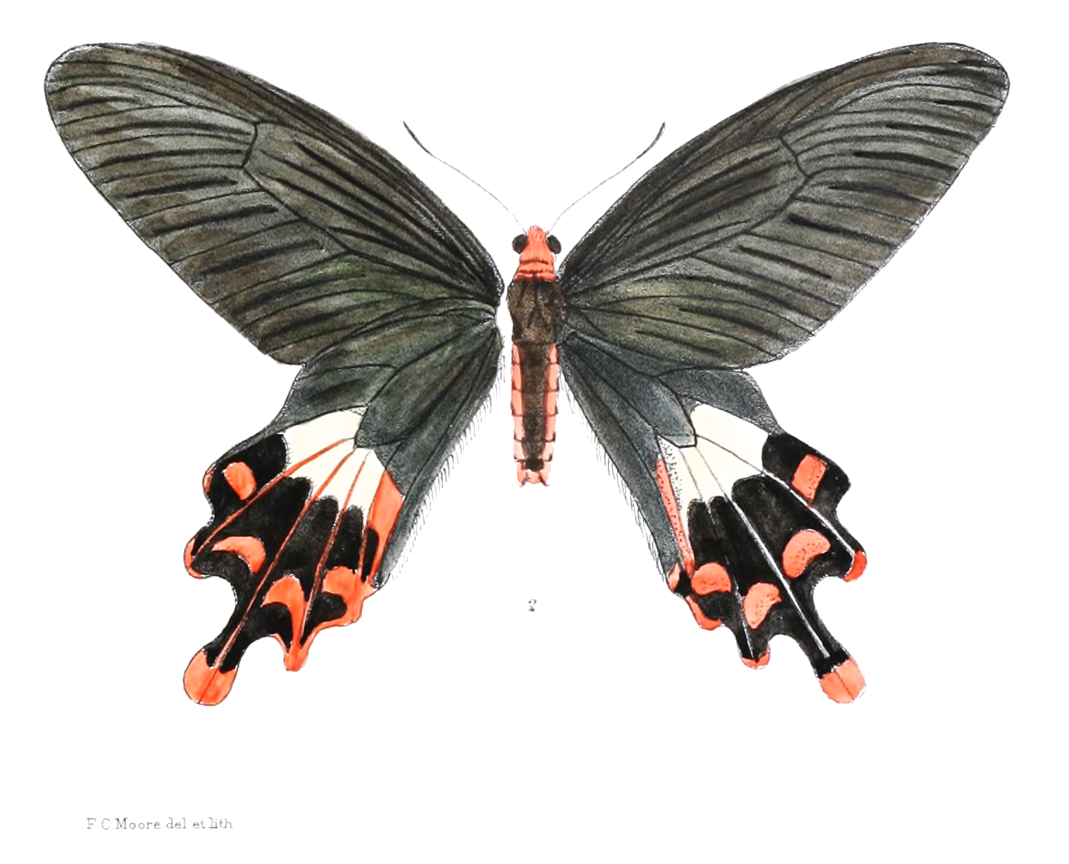 Atrophaneura polla (male)